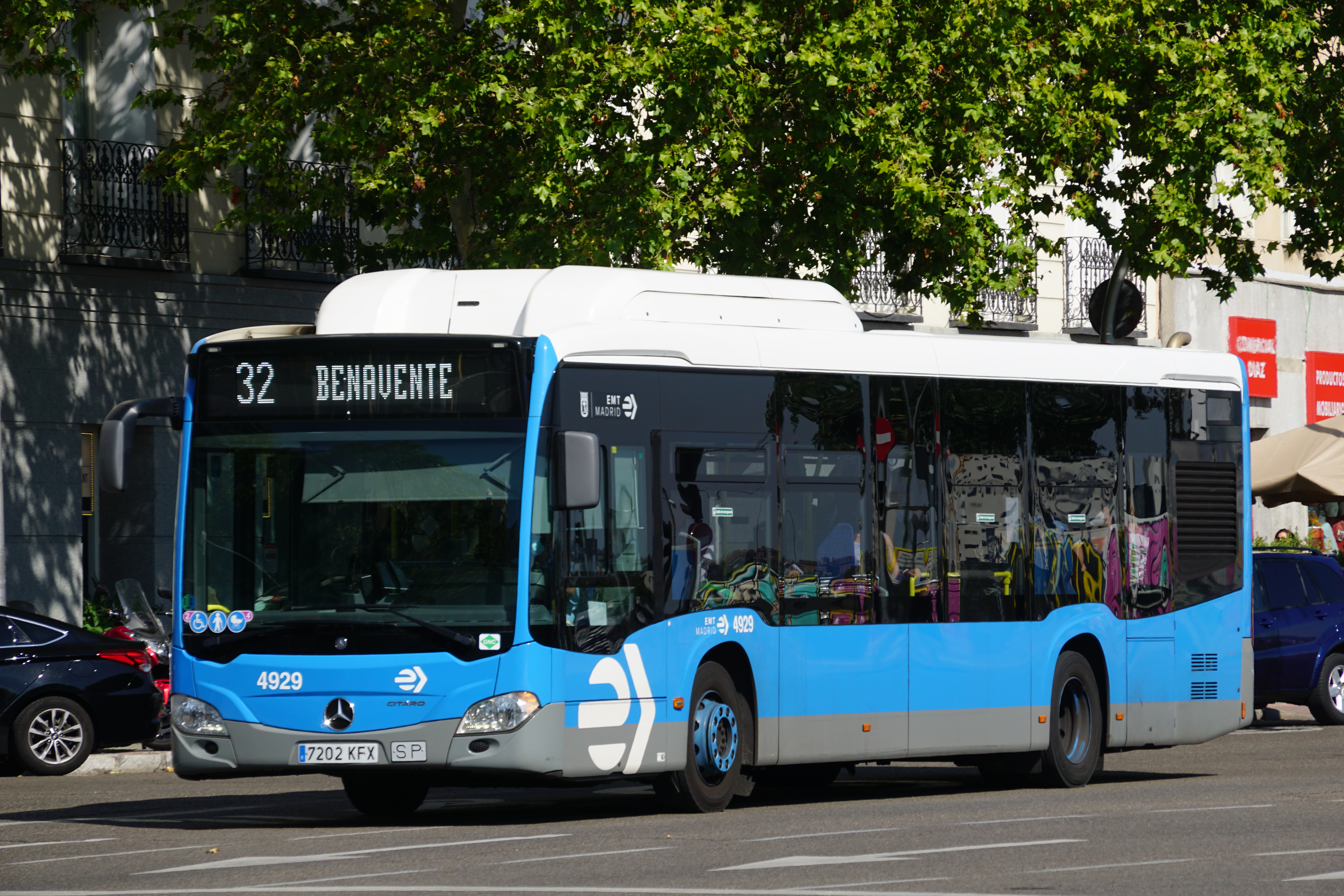 32 EMT Madrid en la estación de Atocha, agosto 2020